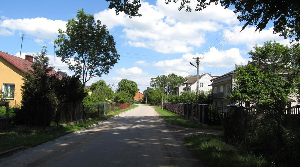 Krasnodęby-Kasmy